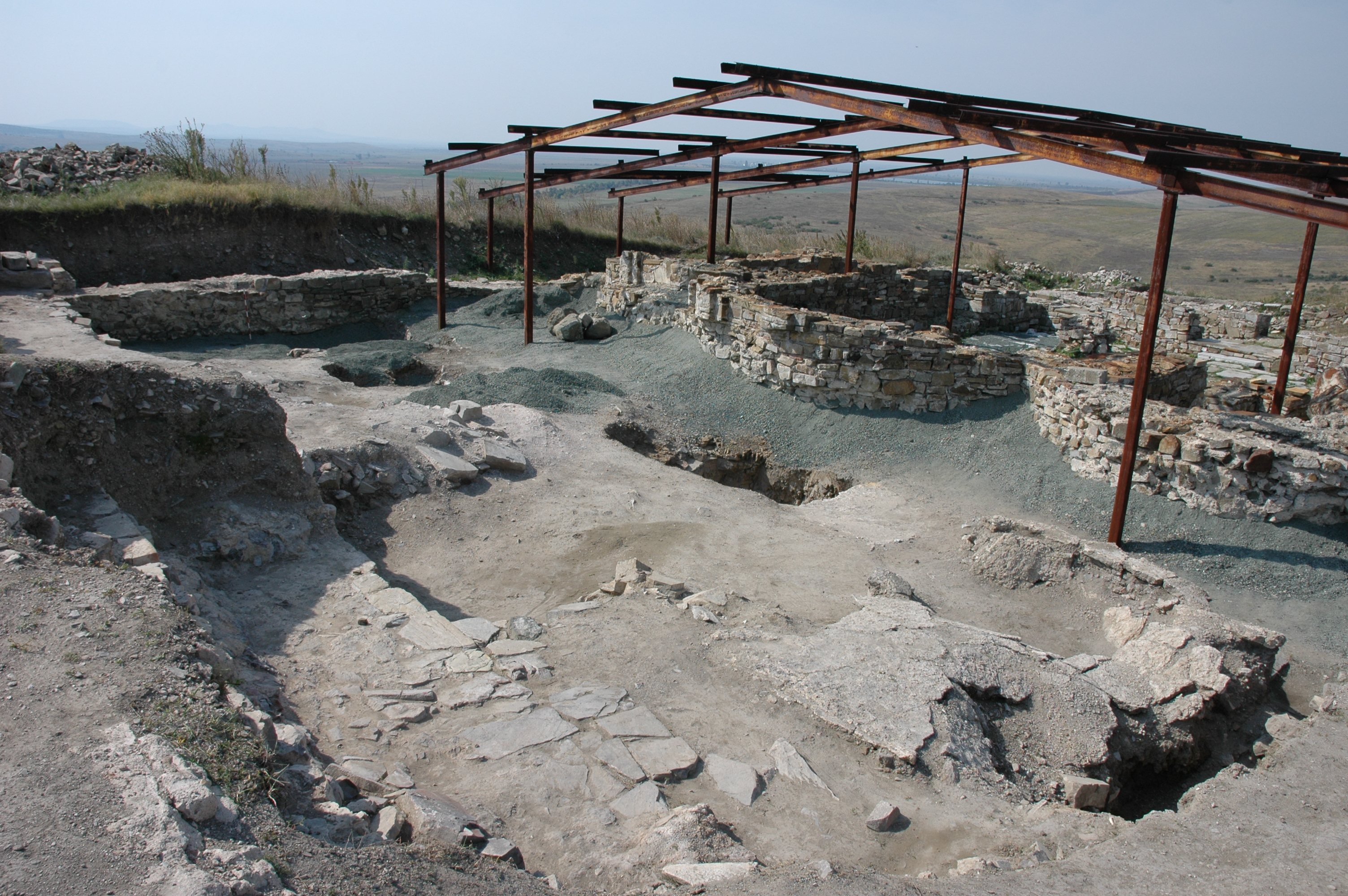 Църковен комплекс. Снимката е предоставена от Исторически музей Карнобат - 2006г.